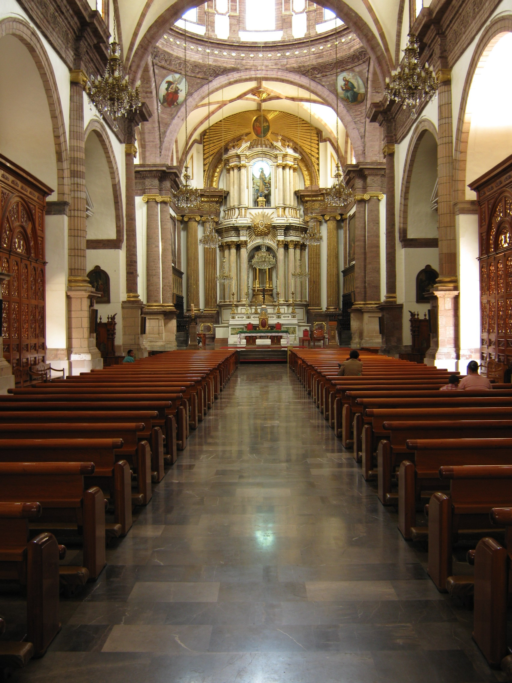 Interior de la catedral de Zamora, Michoacán